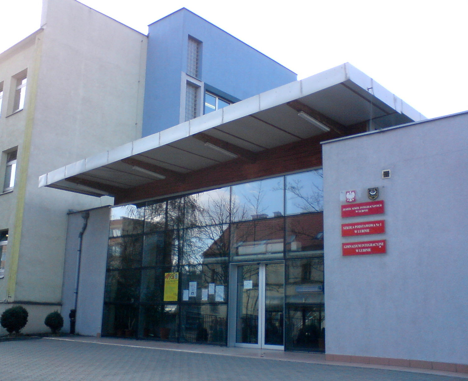 Budynek Zespołu Szkół Integracyjnych w Lubinie / Building of Zespół Szkół Integracyjnych in Lubin